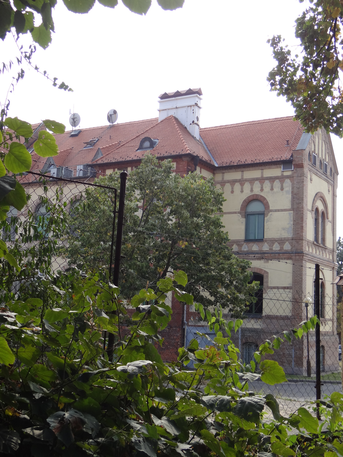 Klinika (Pécs, Garai u. 3.)